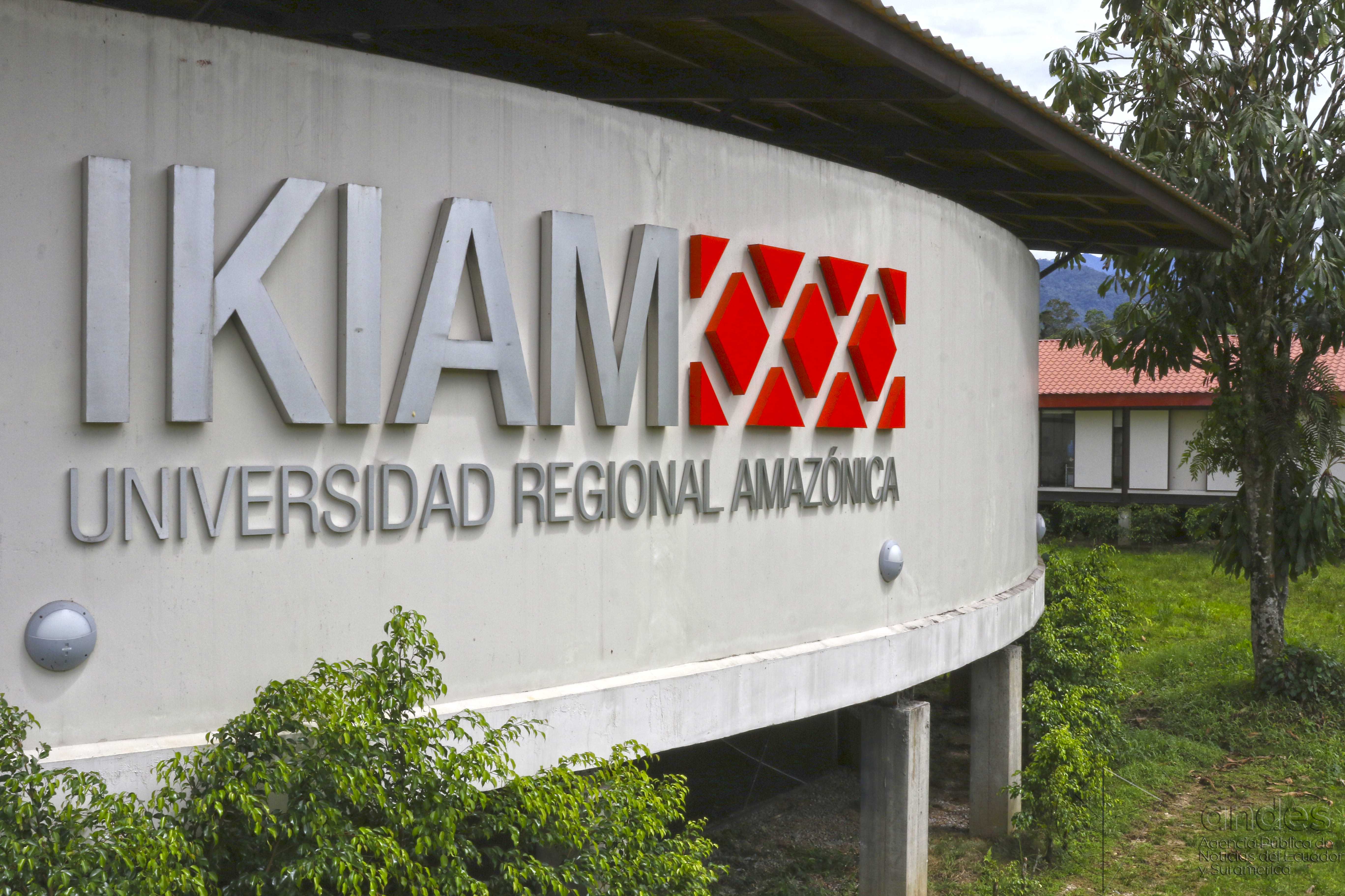 Tena (Napo), 12 ago (Andes).- IKIAM que en lengua shuar significa "selva" es una universidad de investigación y formación de profesionales especializados en Ciencias de la Vida, Ciencias de la Tierra y Ciencia de los Asentamientos Humanos. está situada en la Amazonía ecuatoriana, a 6 kilómetros de la ciudad de Tena, en la provincia de Napo. Cuenta con aproximadamente 260 estudiantes de las 24 provincias del Ecuador. ANDES/Micaela Ayala V.